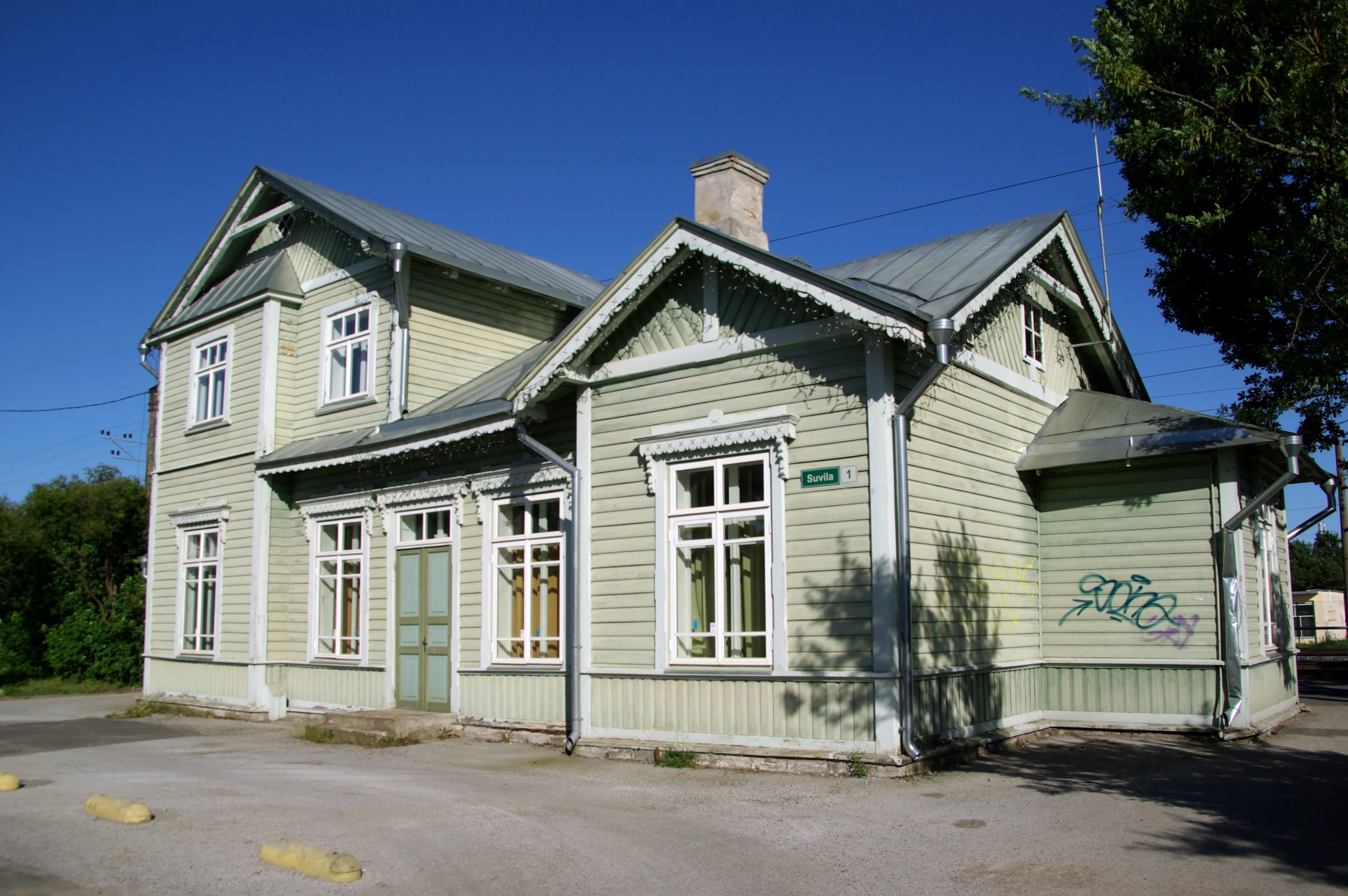 Harju maakond, Tallinna linn, Pääsküla raudteejaam, Suvila tn. 1